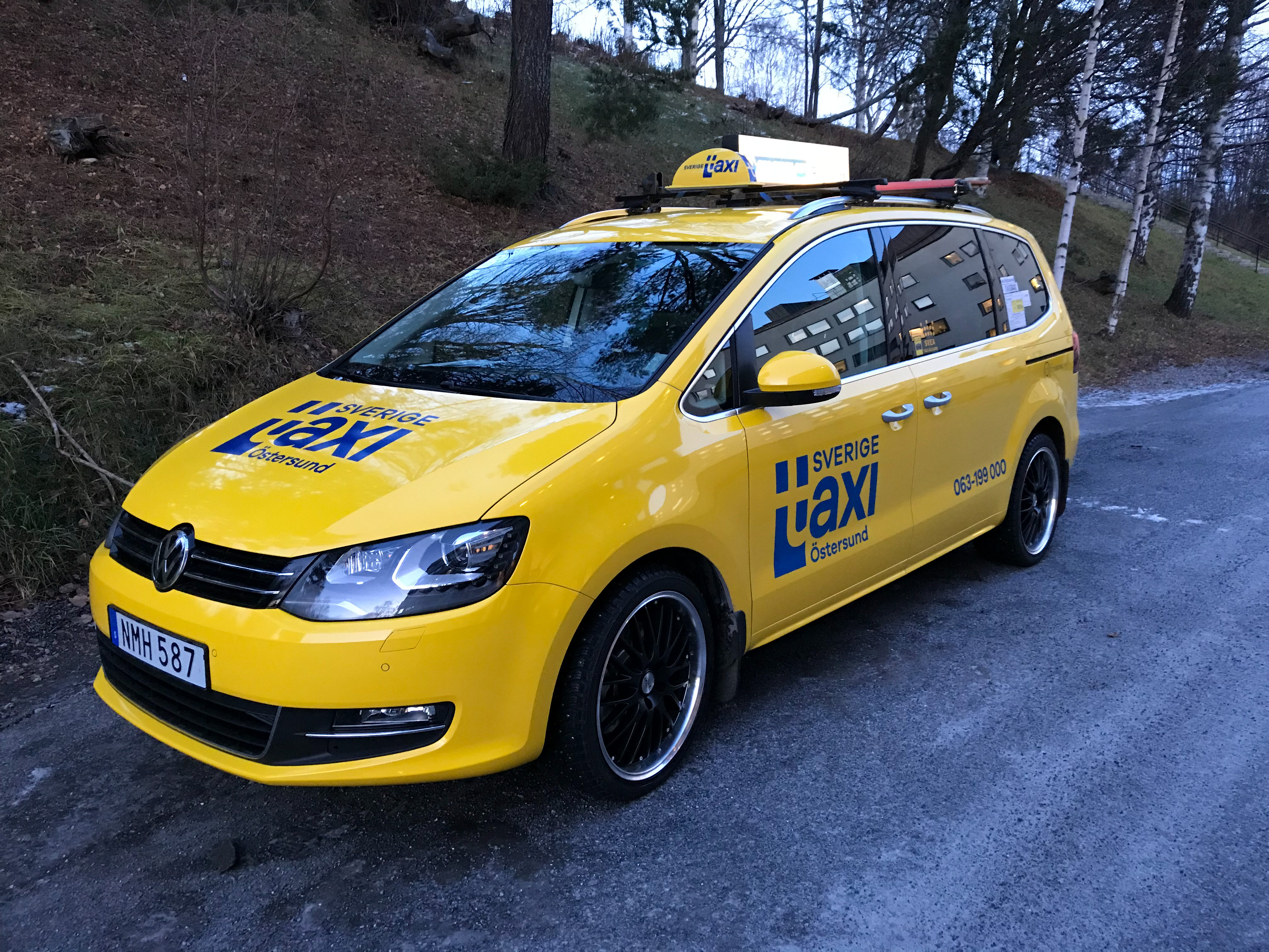 Sverigetaxi Östersunds fordon